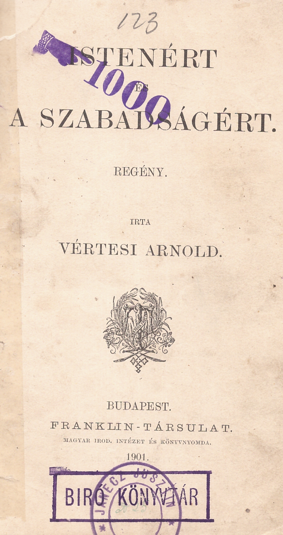 Vértesi Arnold (1834-1911): Istenért és szabadságért (1901)